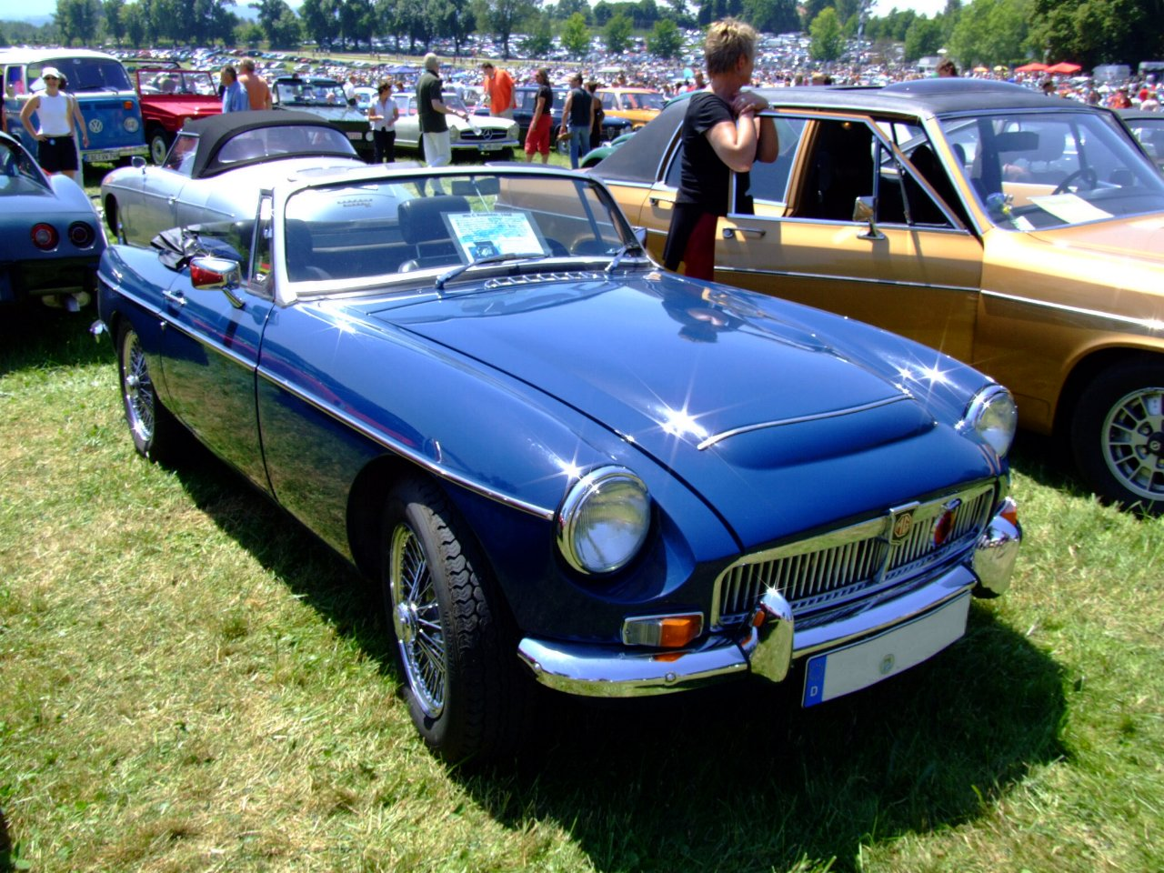 MG C Roadster 1968 Baujahr: 1968 6 Zylinder 2912 ccm